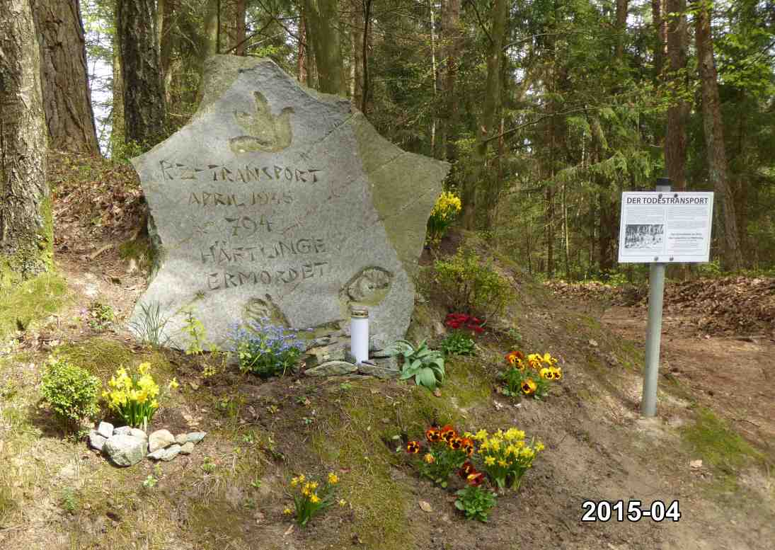 Das Mahnmal vom Friedensforum 1984 errichtet - im Wald gelegen